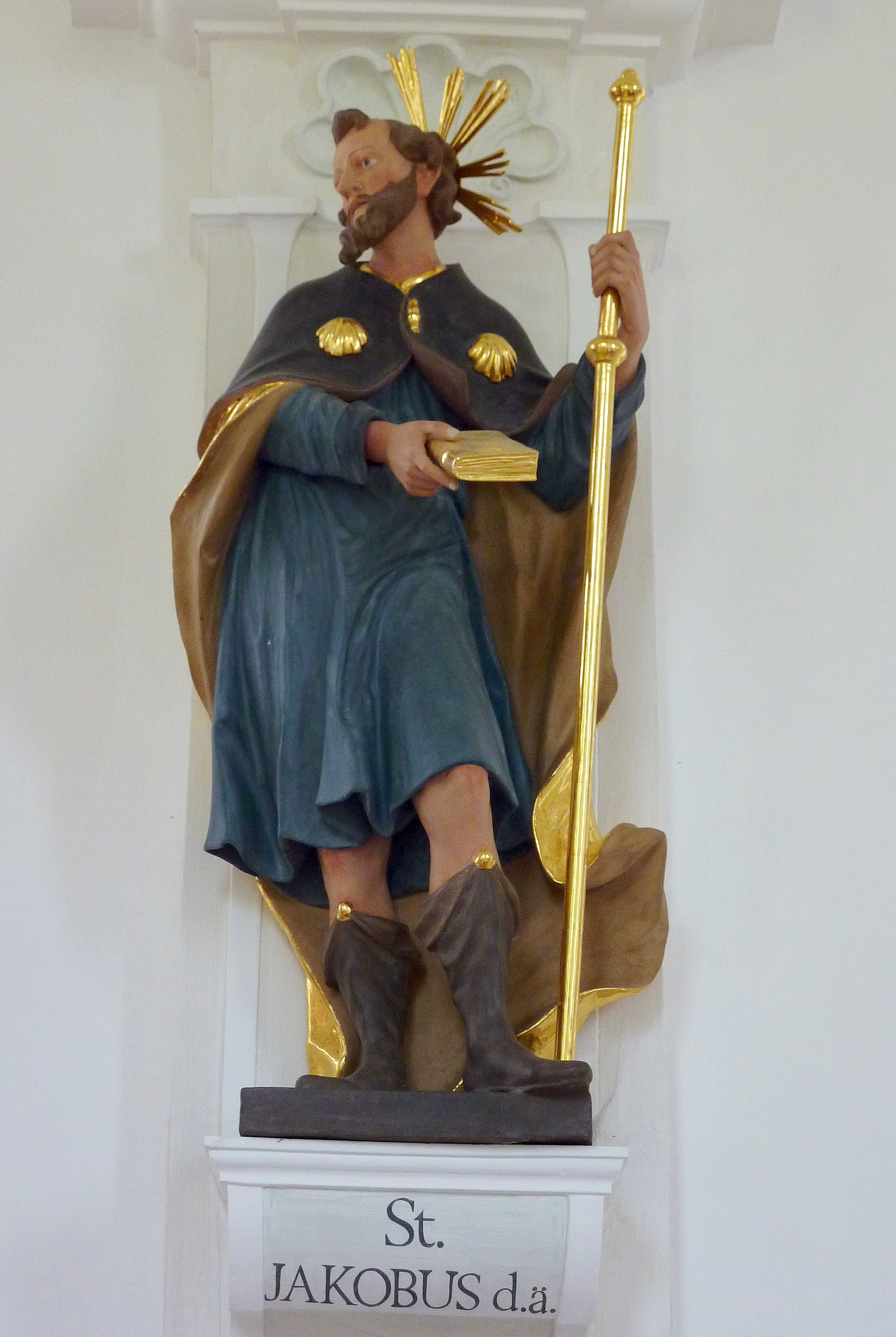 Katholische Filialkirche St. Maria Magdalena in Horgauergreut, einem Ortsteil von Horgau im Landkreis Augsburg (Bayern), Skulptur des Apostels Jakobus des Älteren von Joachim Günther (1720-1789) von 1750/51